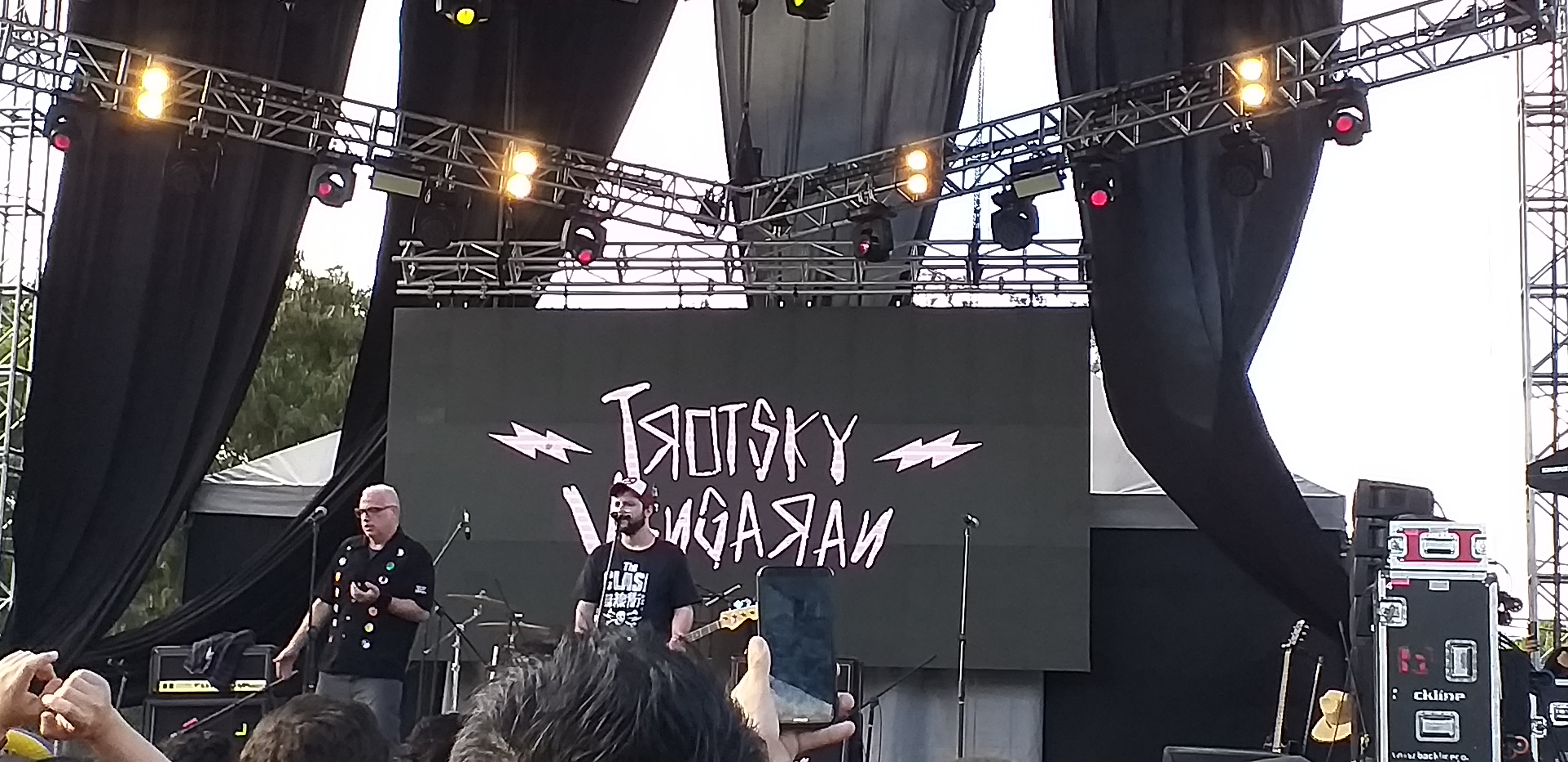 Presentación de la banda en el Carnaval Fest, en Medellín.